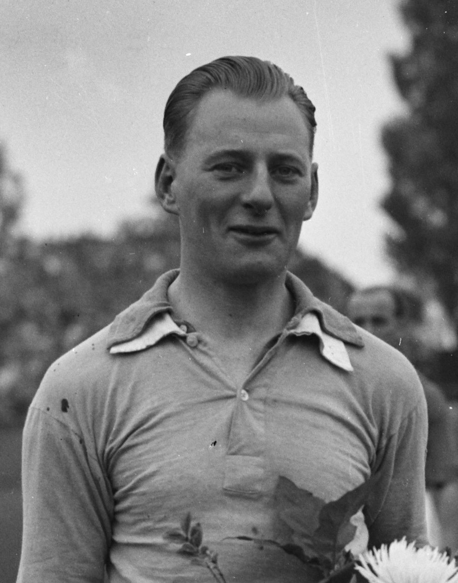 Gerrit Keizer in 1946.